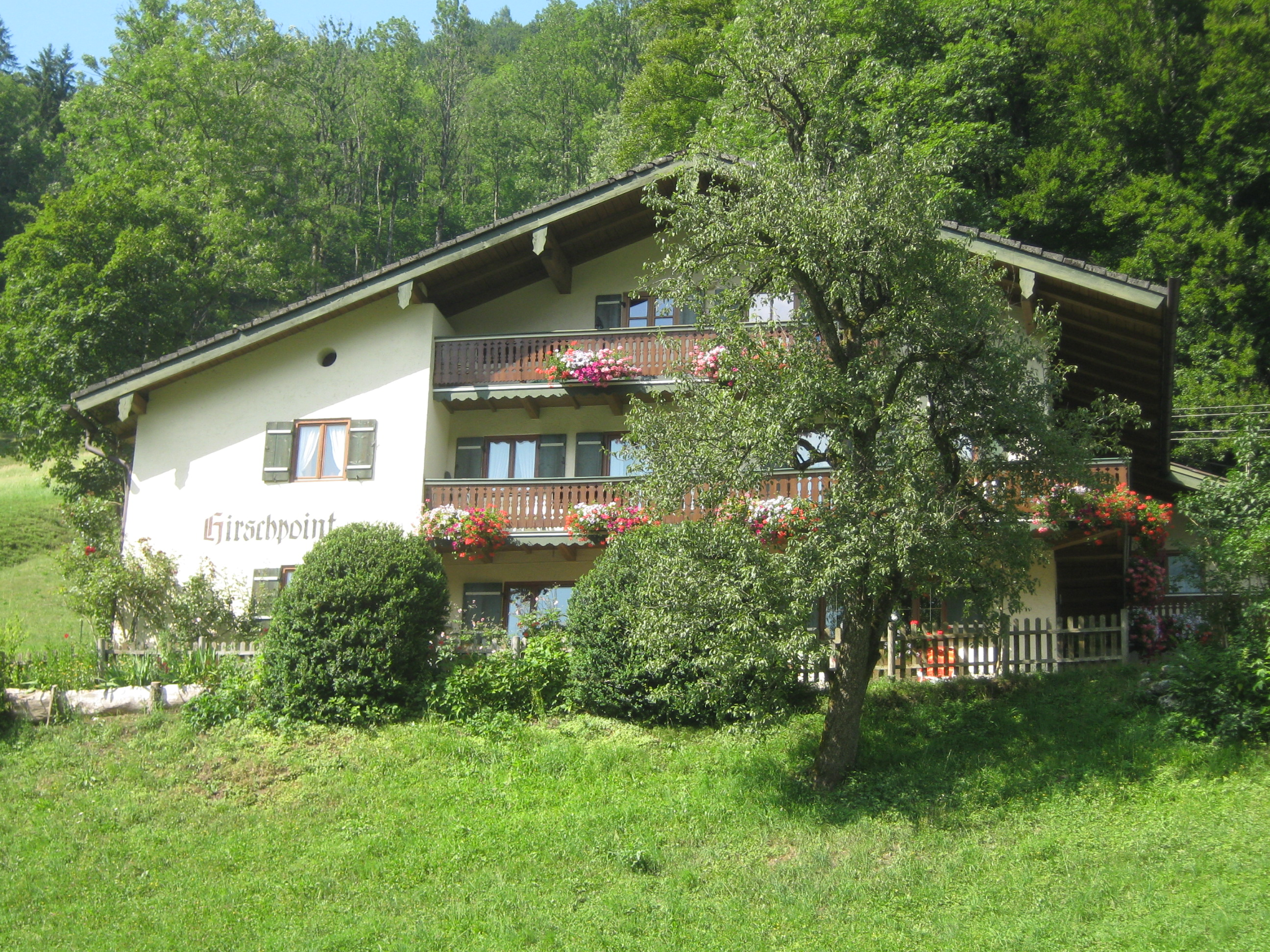 Anwesen Hirschpoint, Gnotschaft Au, Ramsau bei Berchtesgaden (Berchtesgadener Straße 37)